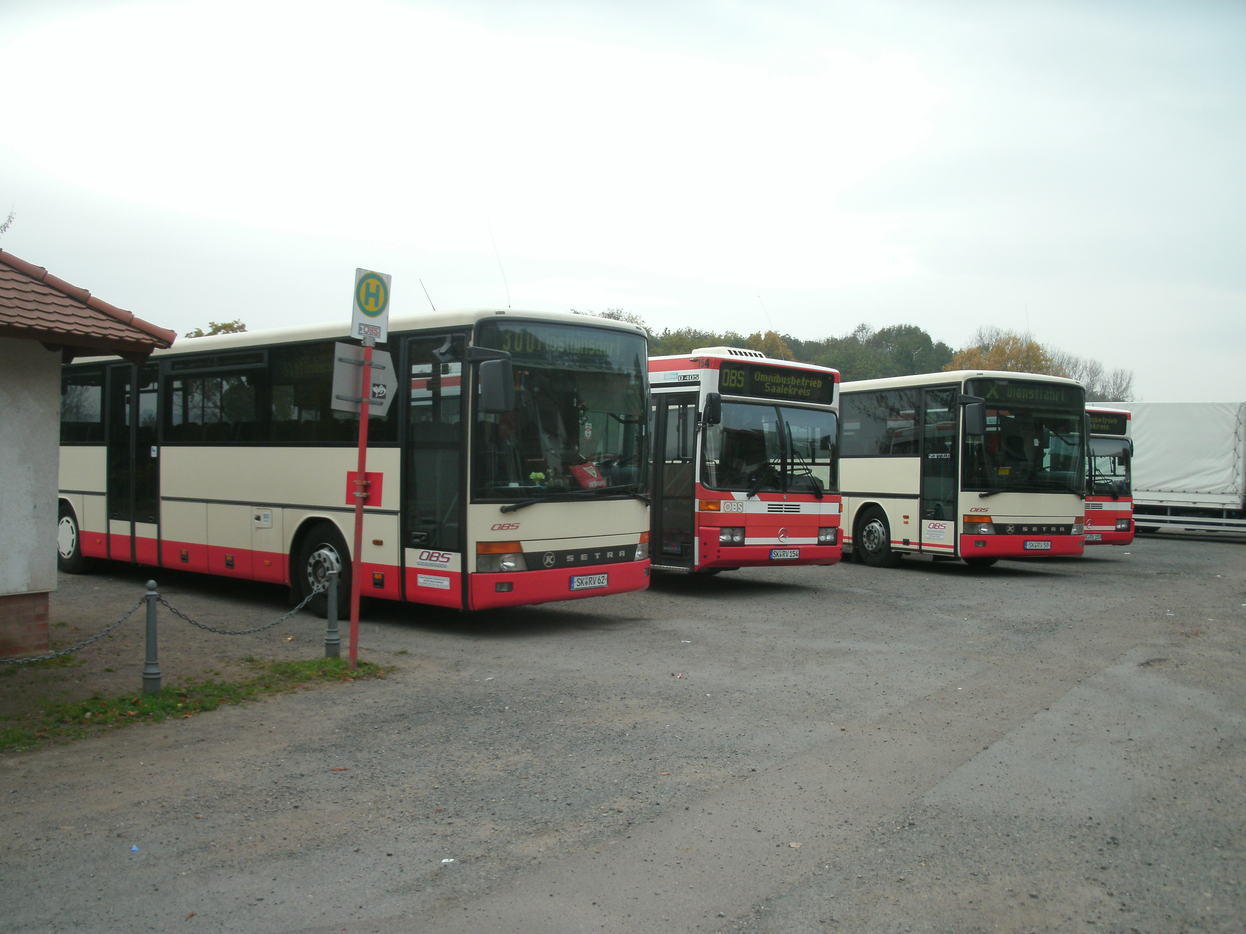 Linienbusse des Omnibusbetrieb Saalekreis (OBS), darunter zwei Mercedes-Benz O 405, in Wettin nahe der Hochseilfähre.